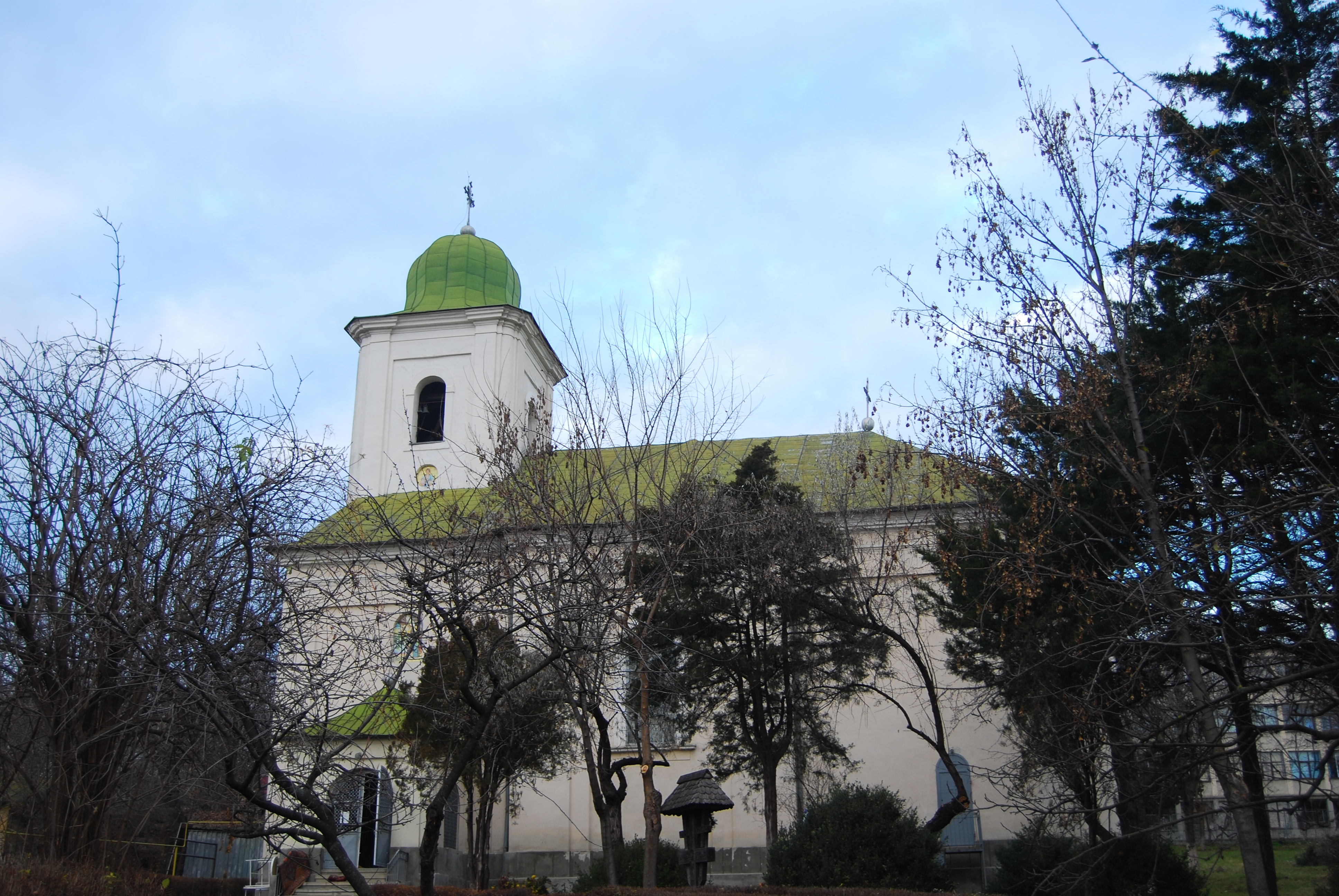 Biserica "Buna Vestire" (Biserica Blagoveștenia din Muntenime)